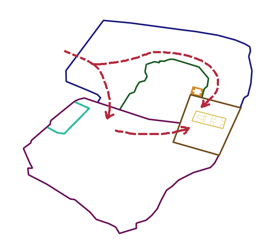 ירושלים 70 - תוכניתו של טיטוס